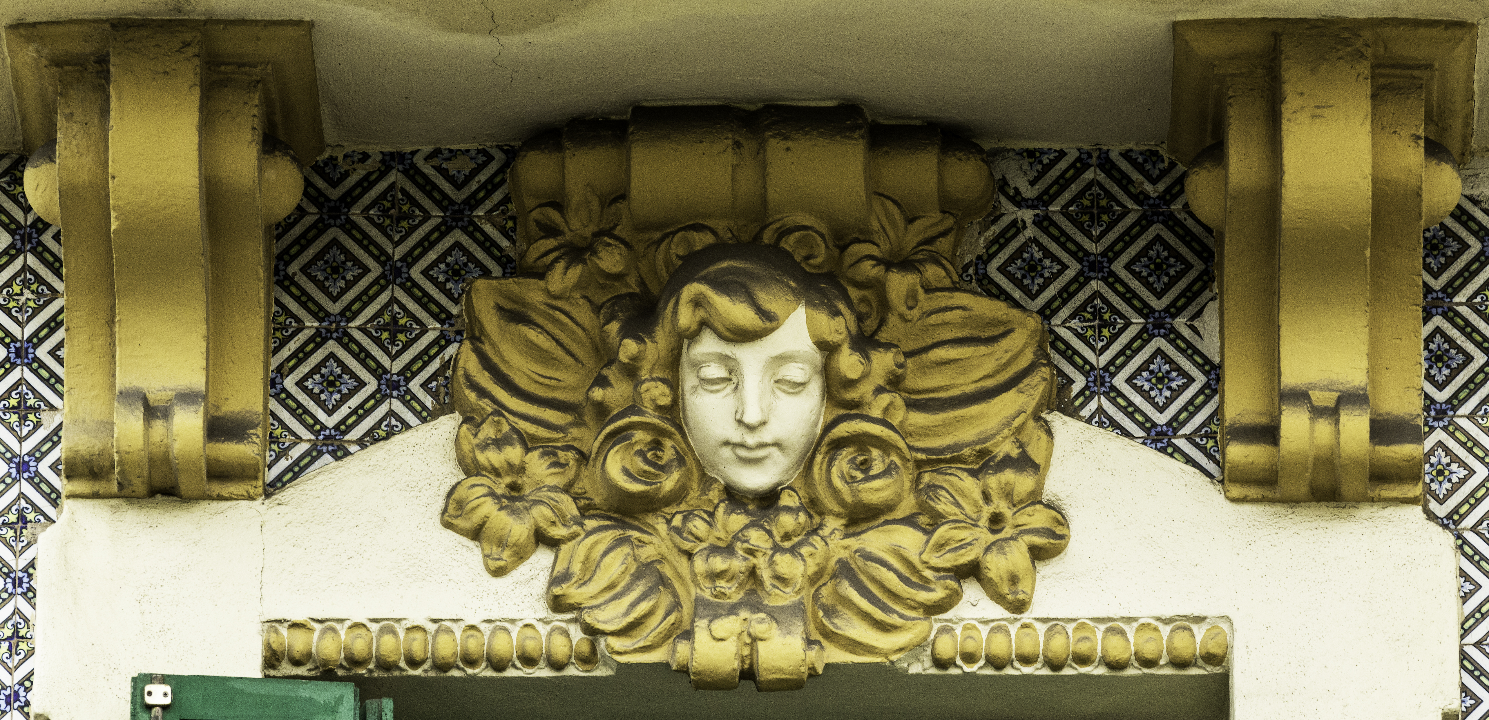 Alto relieve sobre ventana Casa Eulalia Vides. Edificio modernista en la ciudad de Melilla. Fue la casa donde nació y pasó su infancia el poeta Miguel Fernández.